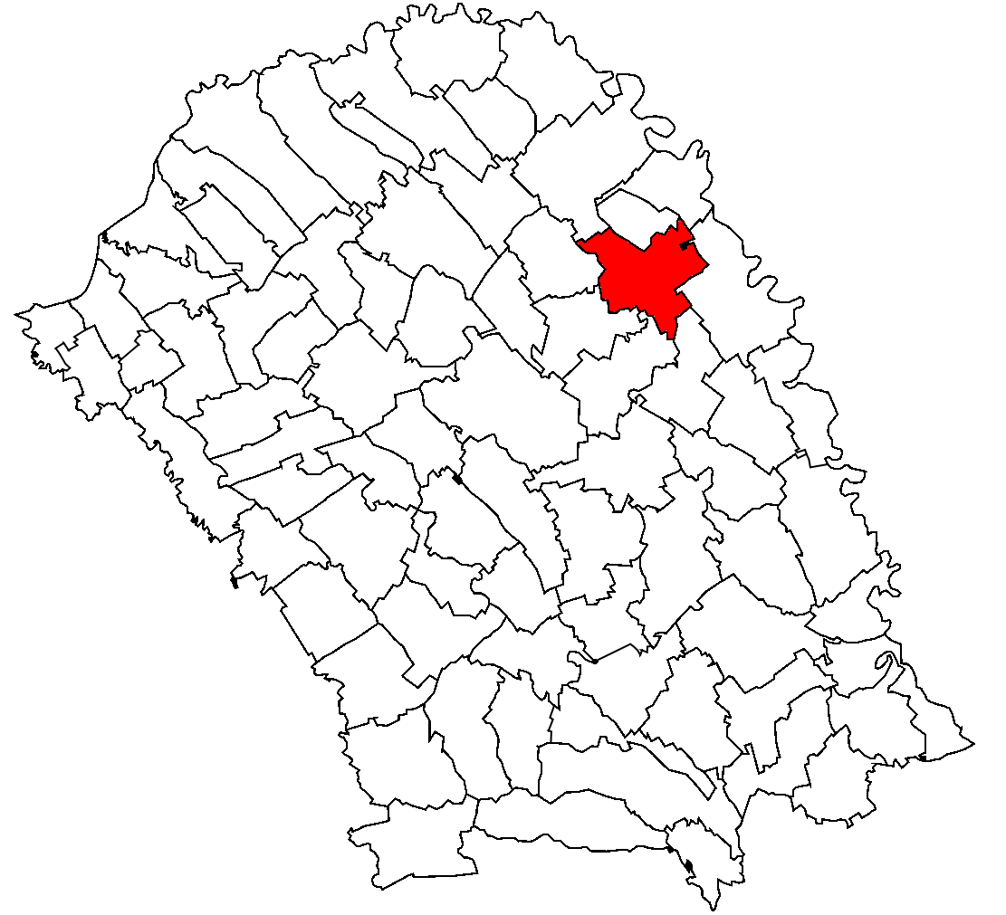 Categorie:Hărţi ale judeţului Botoşani